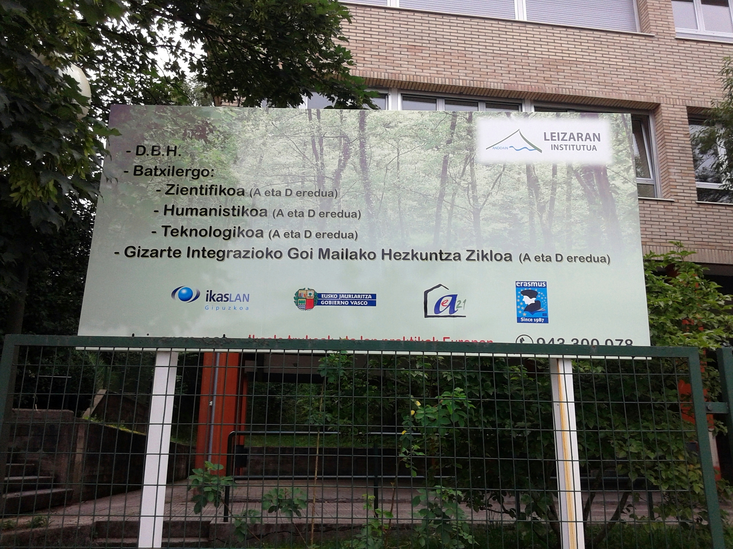 Andoaingo Leitzaran Institutua